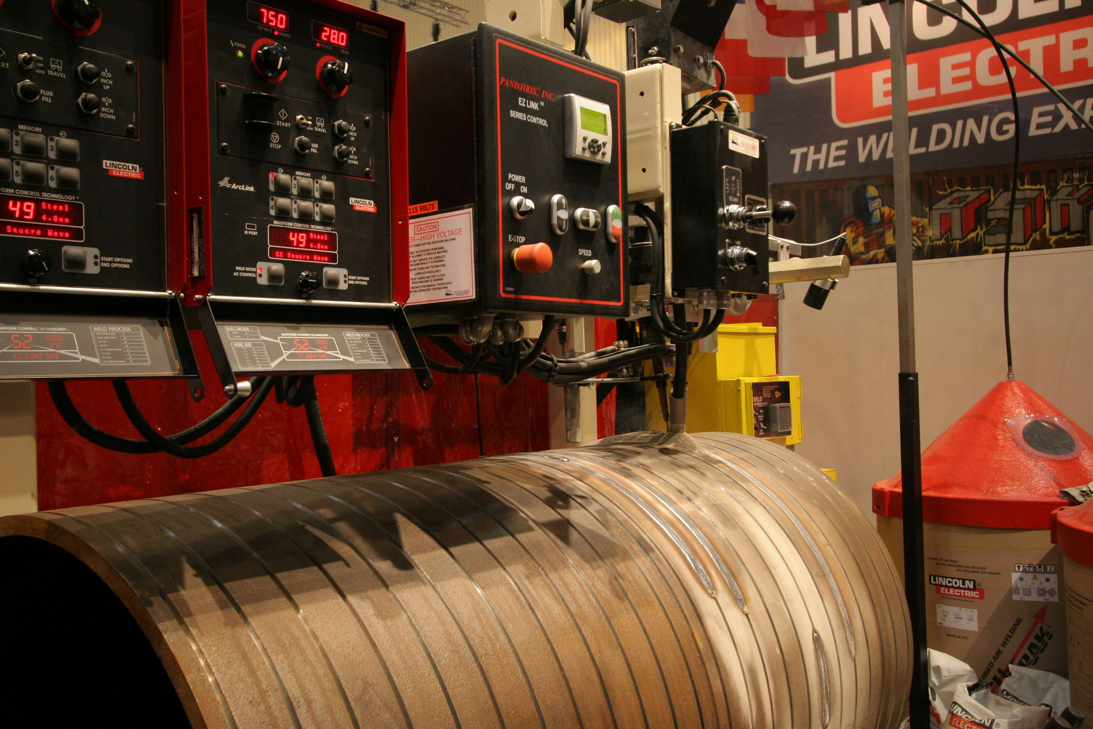 Submerge arc weling demo